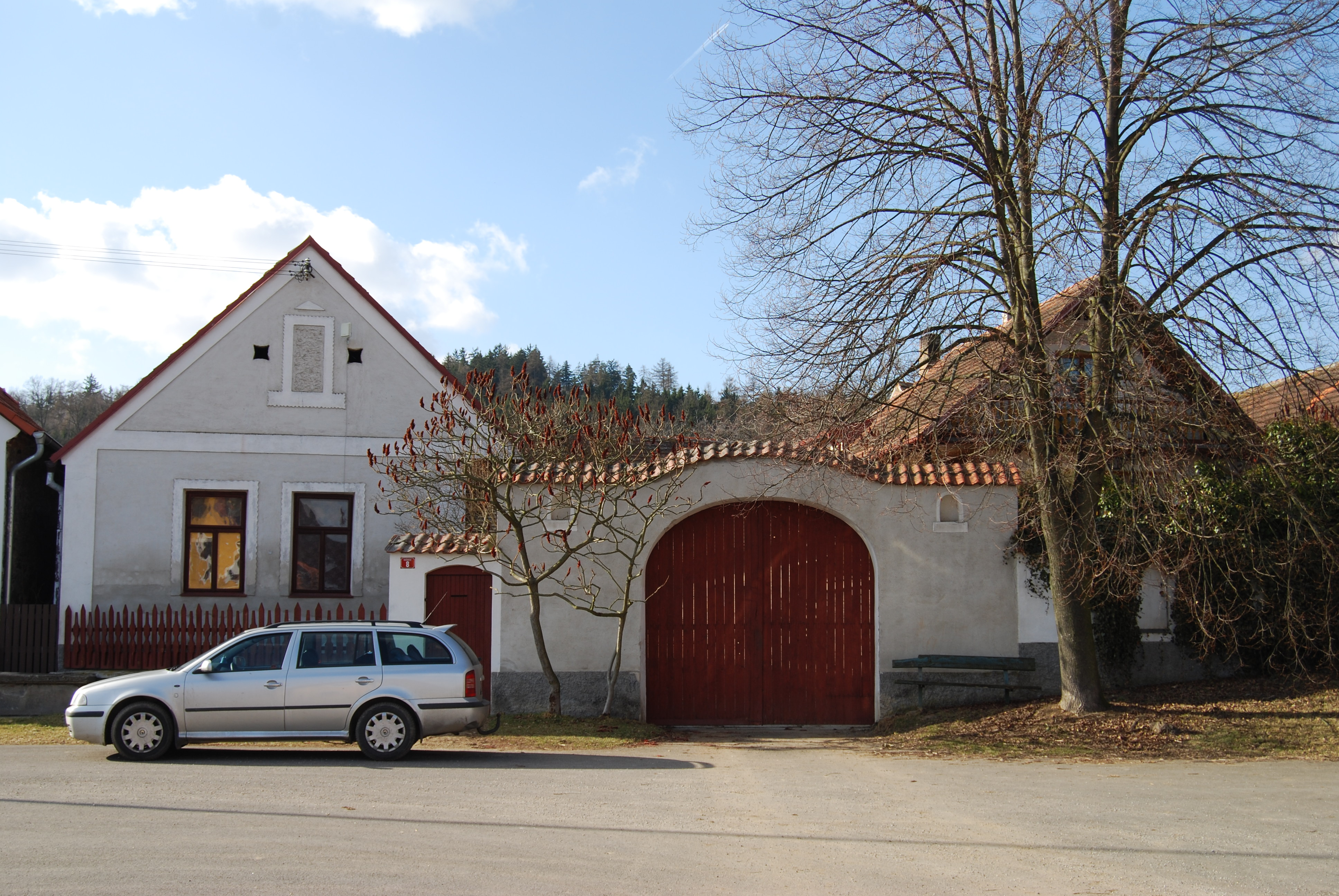 Usedlost čp. 8 v obci. Bošovice je vesnice, část obce Čížová v okrese Písek. Česká republika.